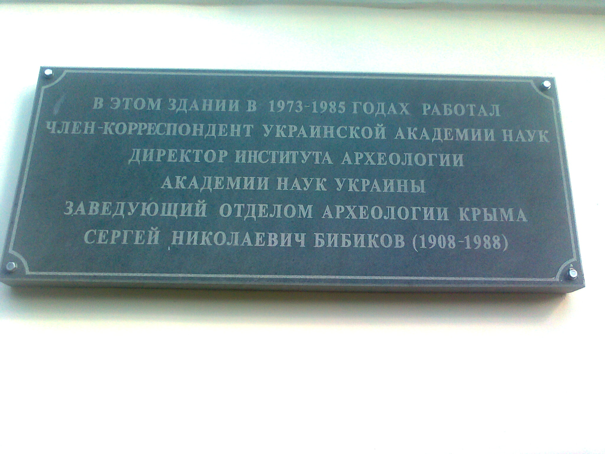 Сергей Николаевич Бибиков, памятный знак